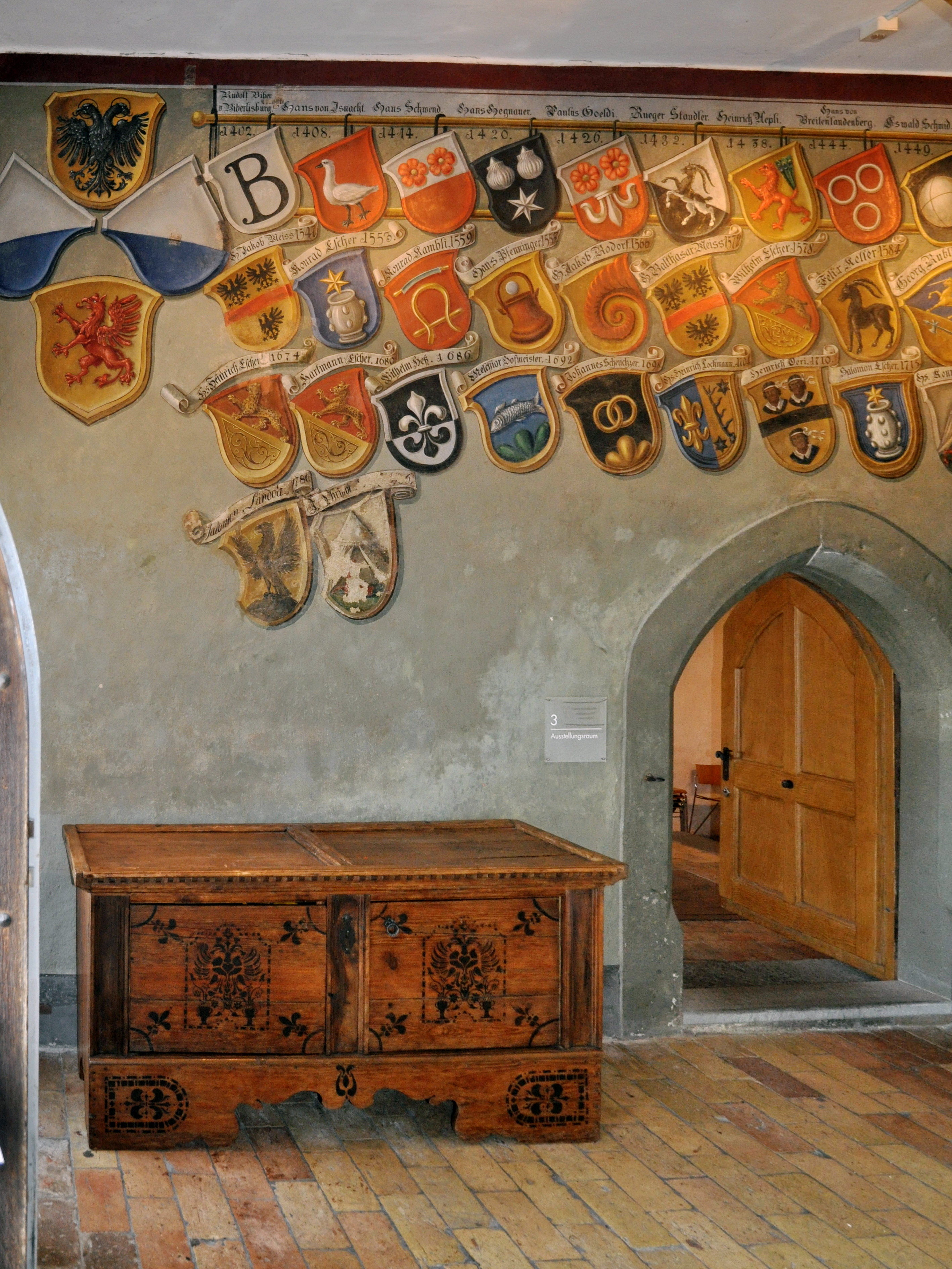 Schloss in Greifensee (Switzerland)